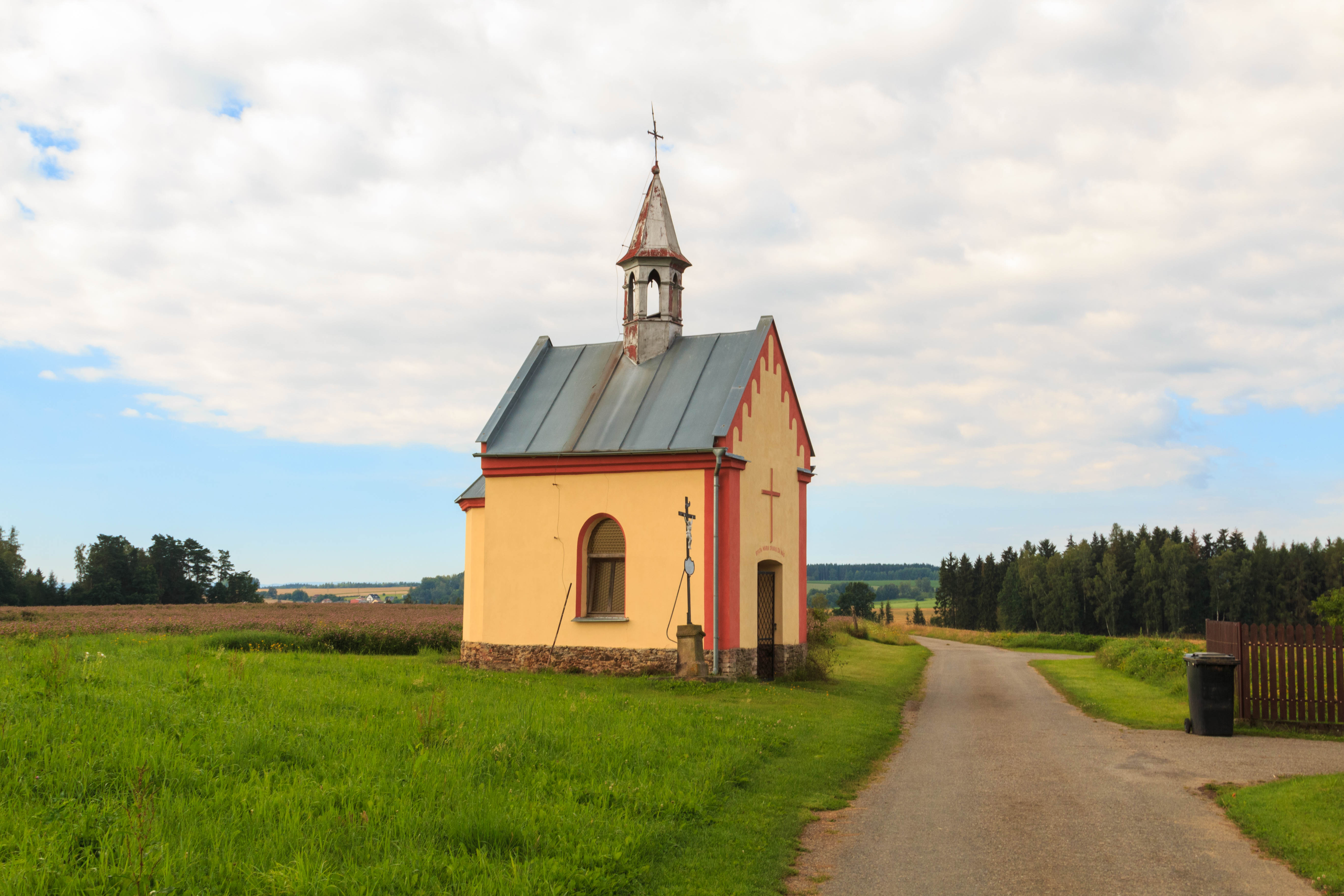 Údolí - kaple